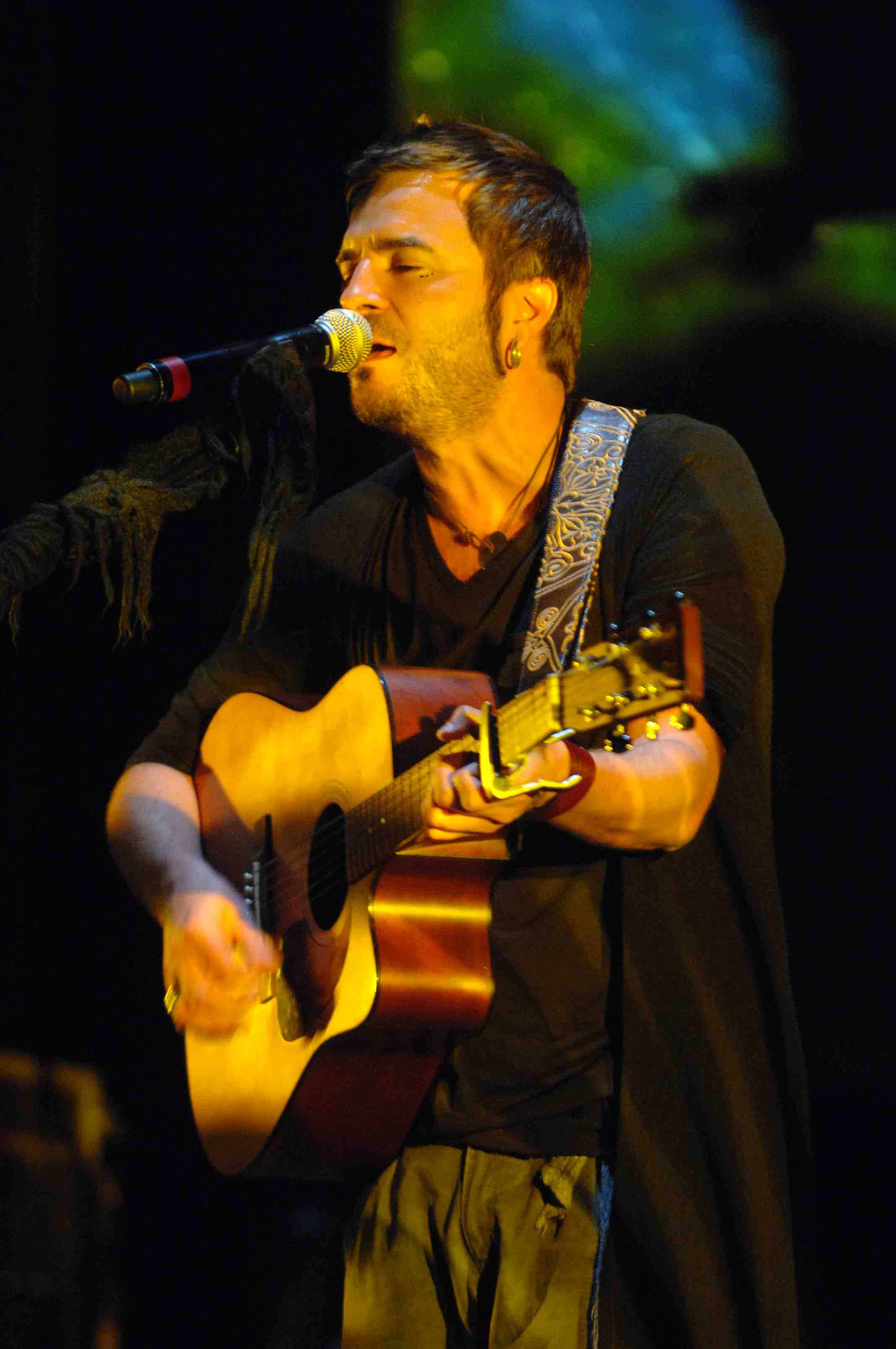 Ken Zazpiko Eñaut Elorrieta, Arrasaten, 2011n.